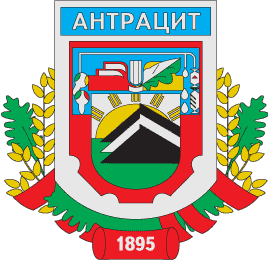 Герб Антрацита